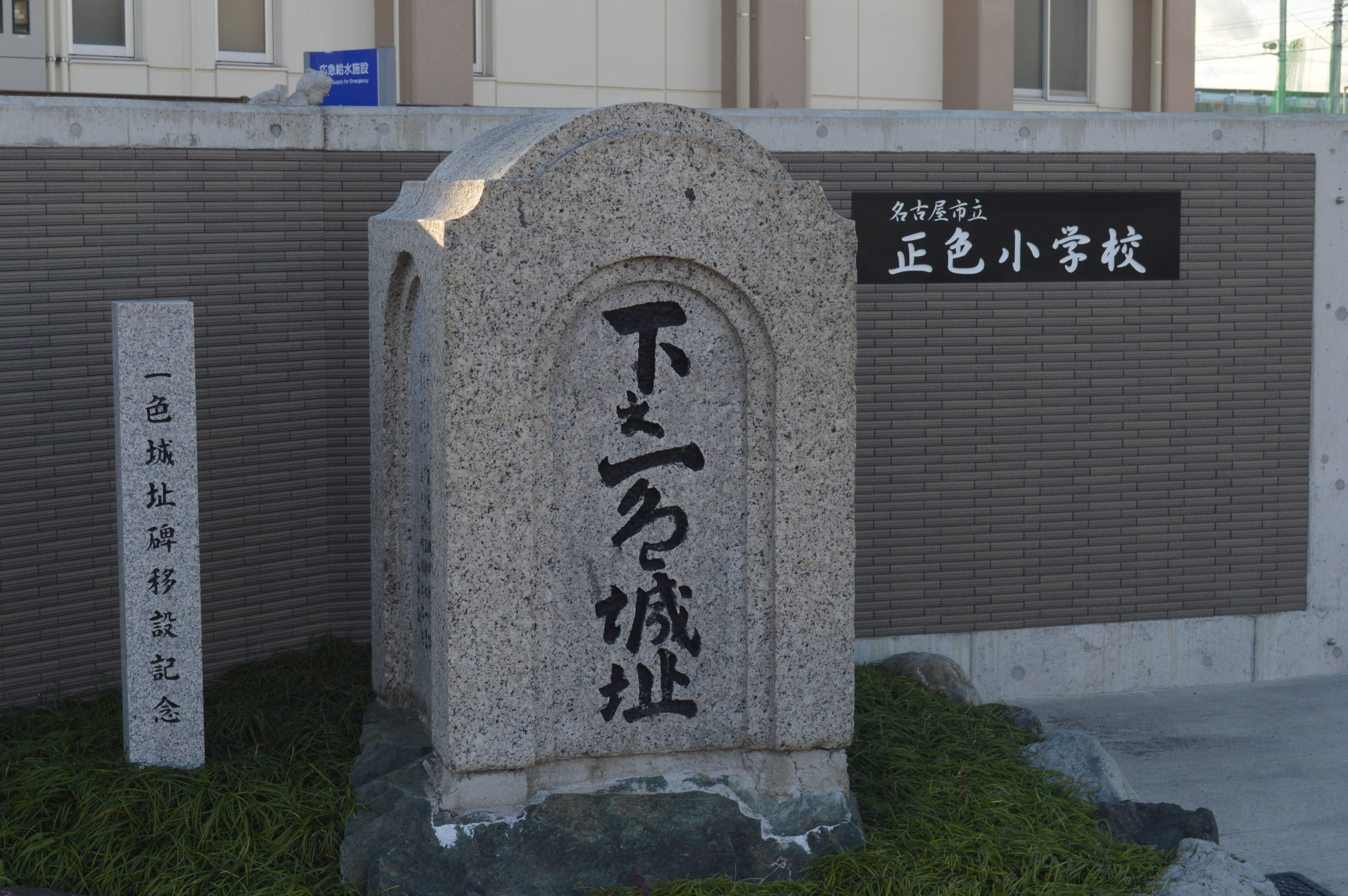 愛知県名古屋市中川区下之一色町にある下之一色城址。名古屋市立正色小学校の門の前にある。